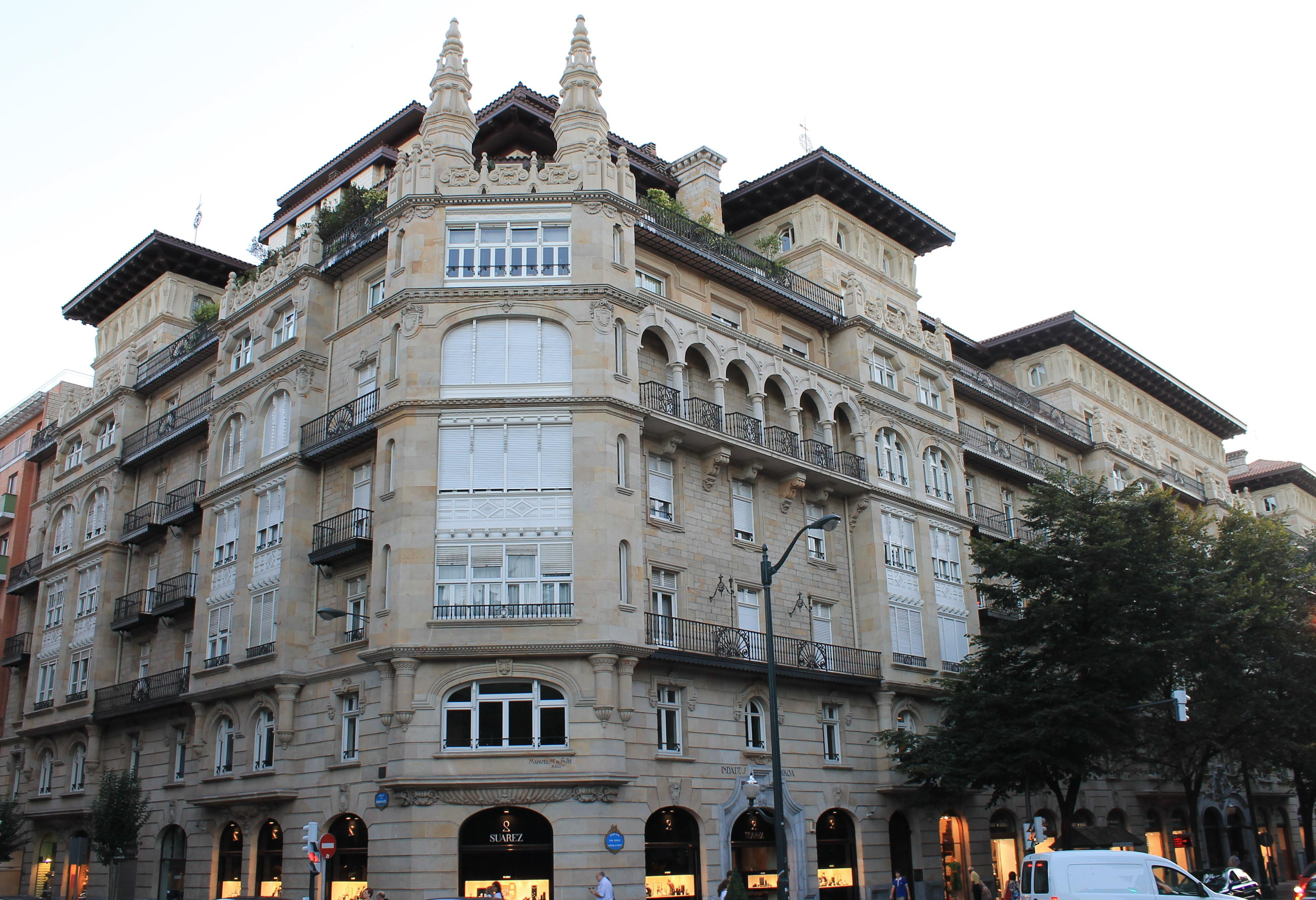 Casas de Sota, situadas en la Gran Vía de Bilbao